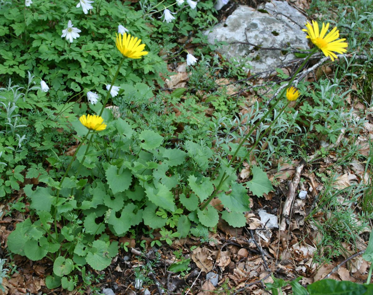 Doronicum columnae, Korbblütler (Asteraceae) - Italien/Italia/Italy: Basilicata, Prov. Potenza, Parco Nazionale del Pollino, Massiccio del Pollino, SSW Rifugio De Gasperi